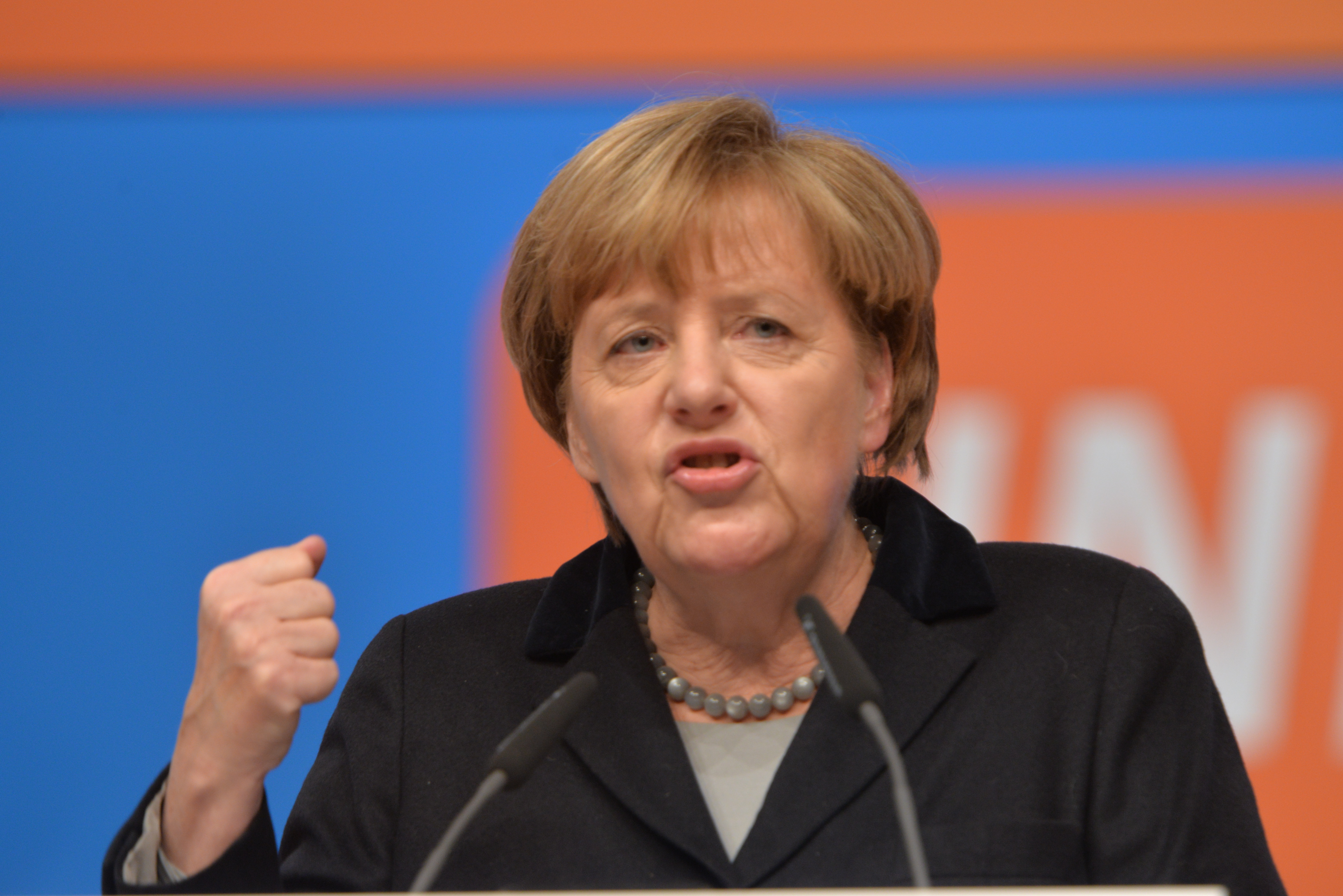 28. Parteitag der CDU Deutschlands am 14. Dezember 2015 in Karlsruhe 28. Parteitag der CDU Deutschlands